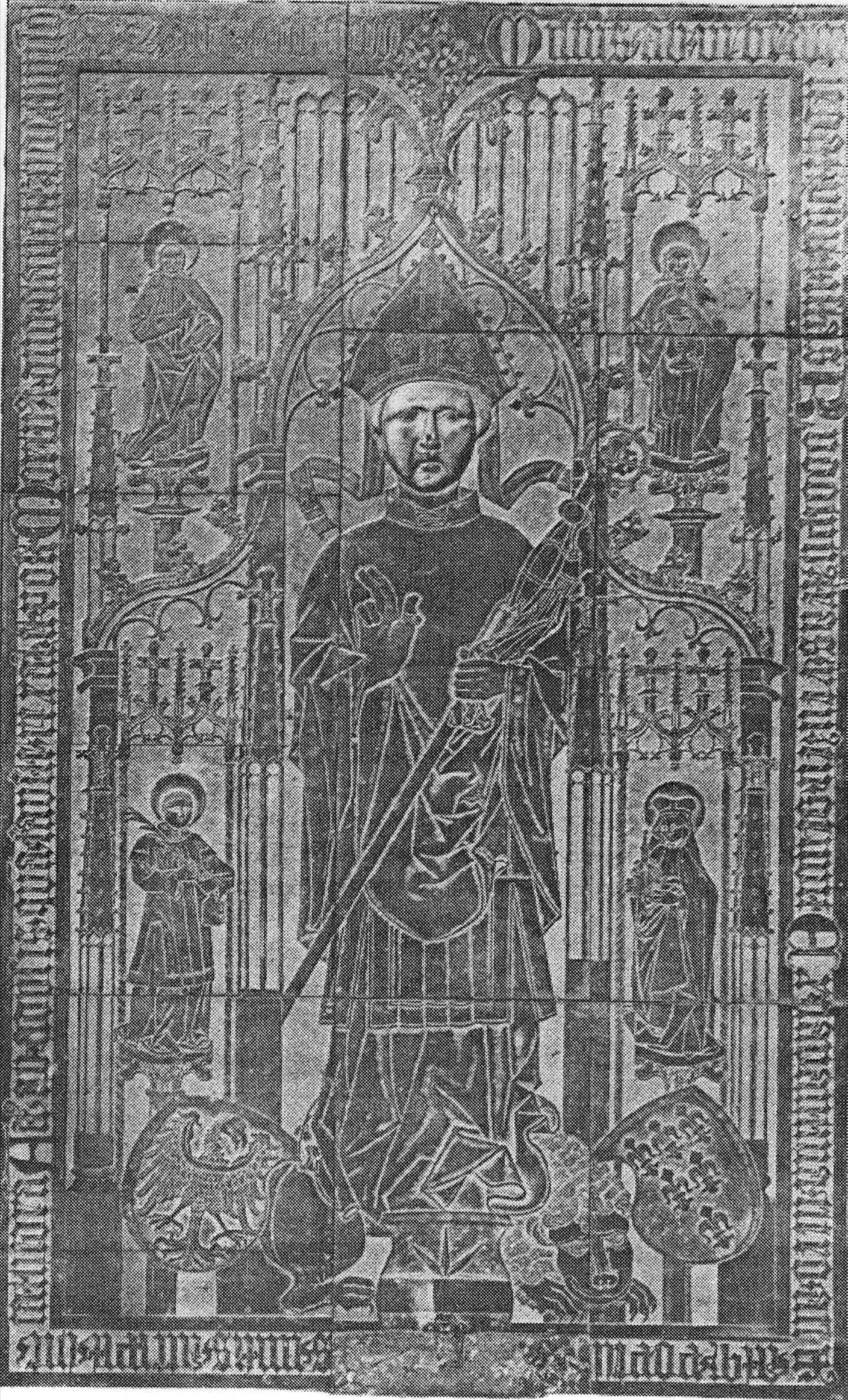 Nagrobek biskupa Rudolfa von Rüdesheim